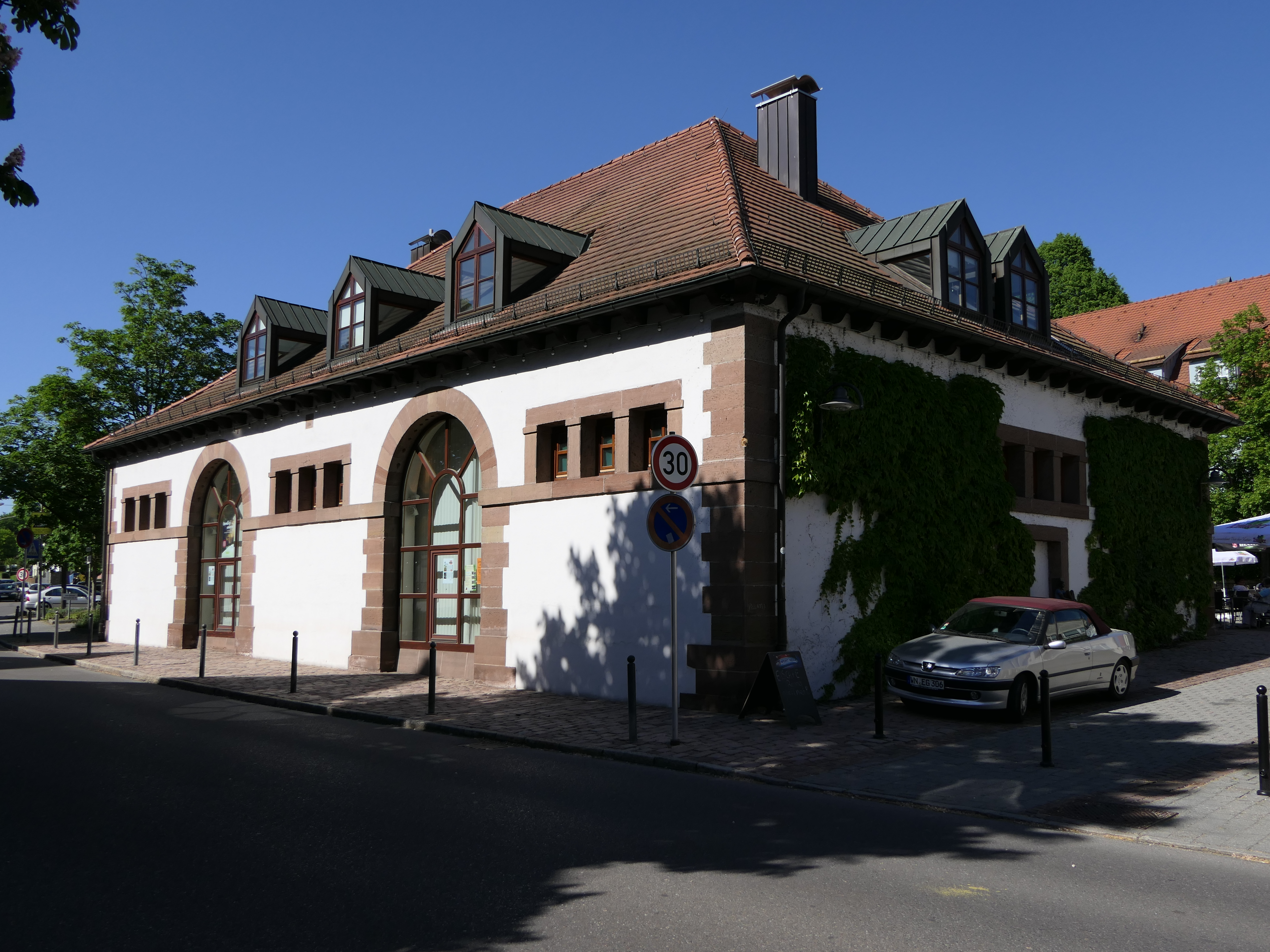 Die alte Kelter in Korb, Rems-Murr-Kreis.